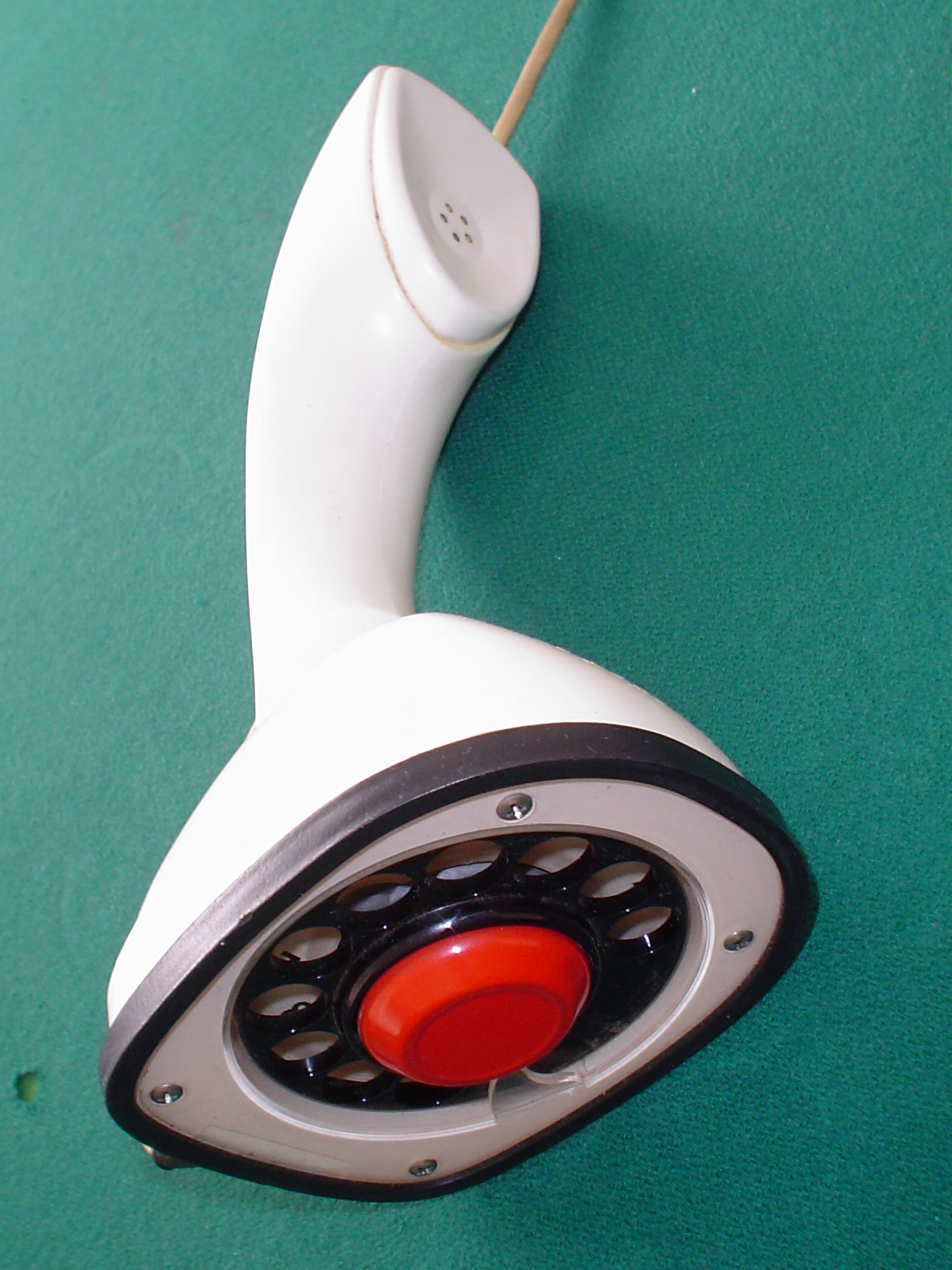 Ericofon renverse, verŝajne la unua integra tabla telefono